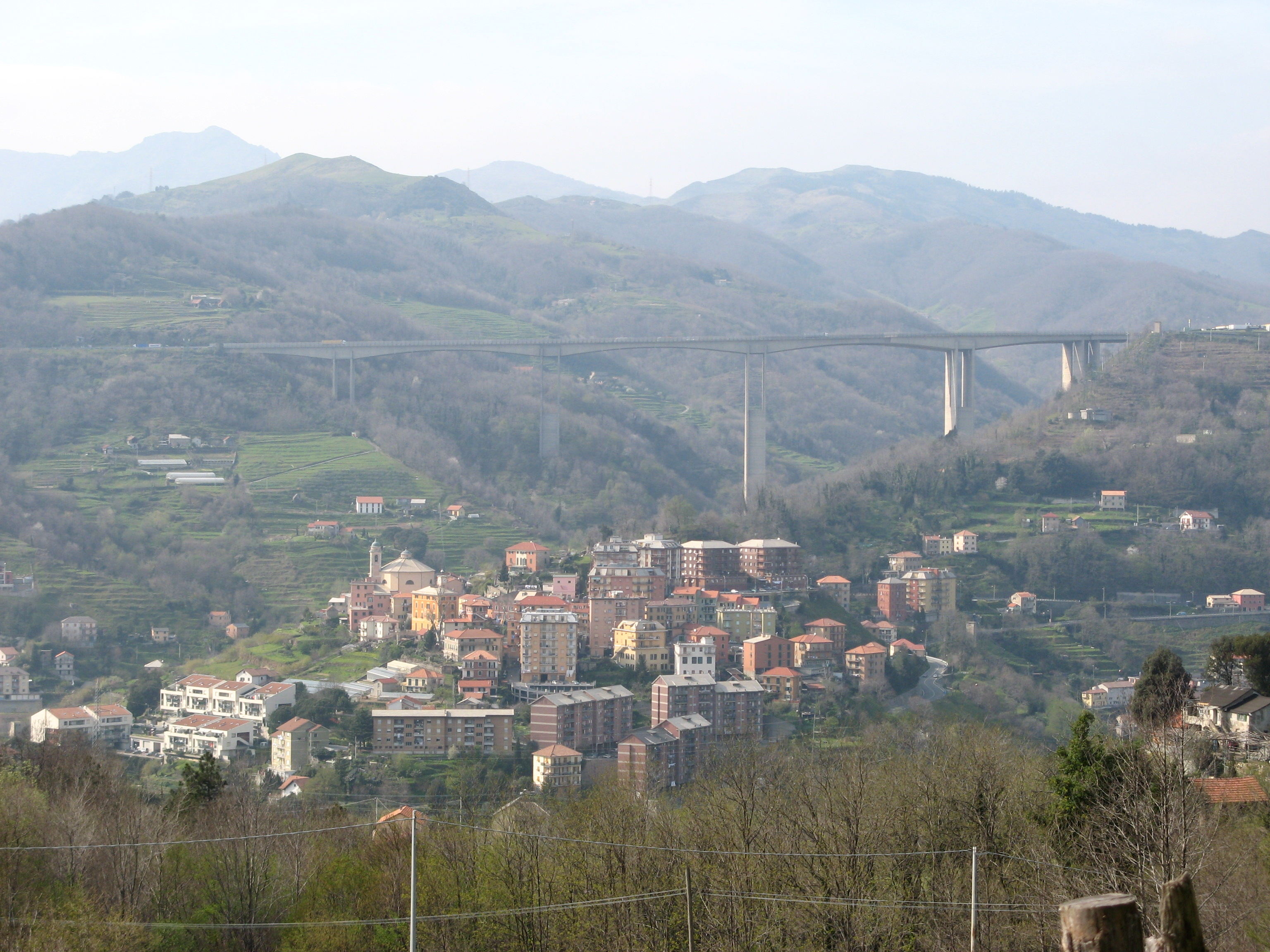 Vista del paese di Mele in provincia di Genova